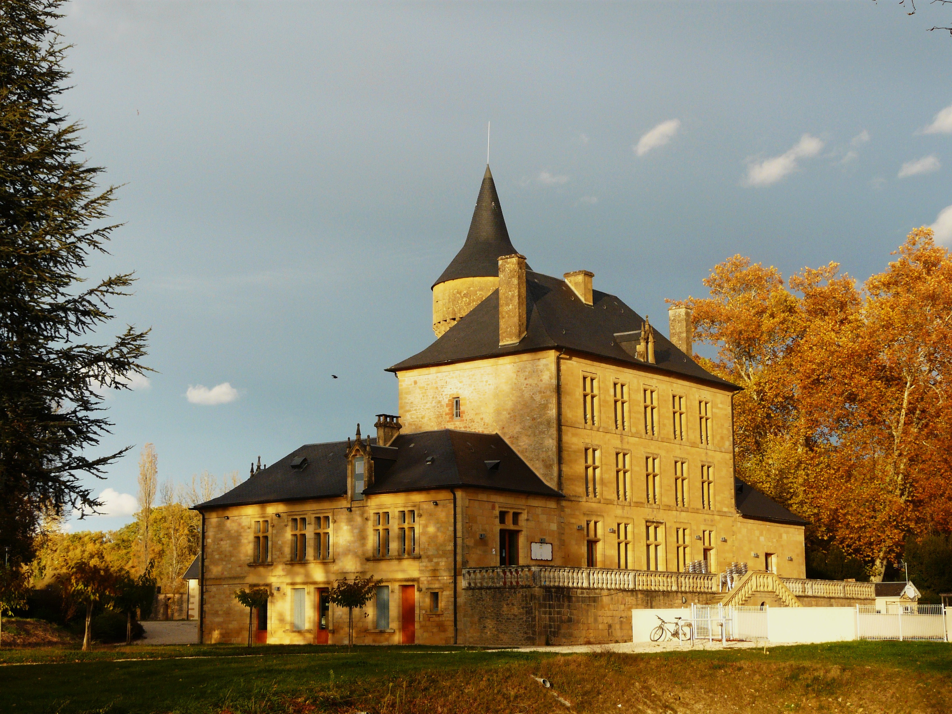 Le château de Pelvézy vu du sud-ouest, Saint-Geniès, Dordogne, France.